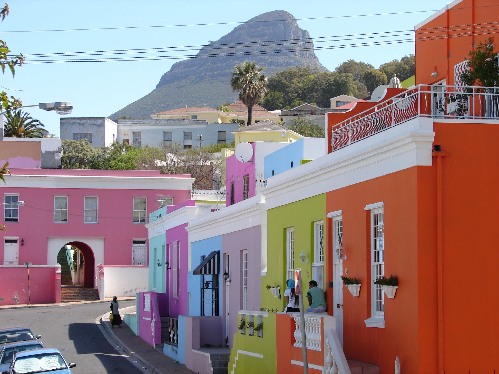 Bo-Kaap street